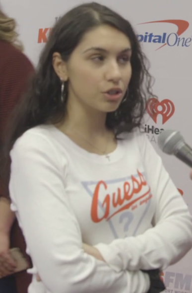 Alessia Cara in interview at Jingle Ball 2018